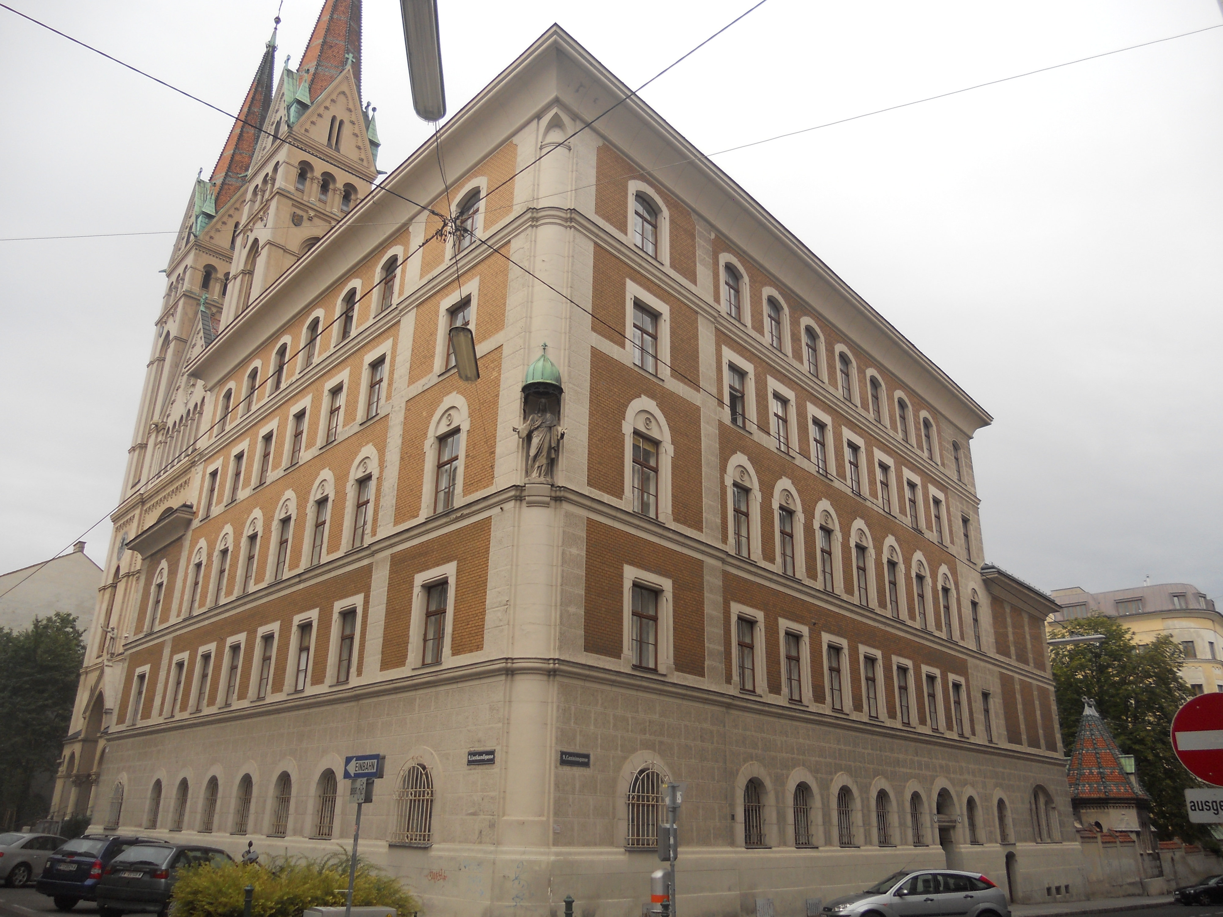 Der Pfarrhof der Canisiuskirche in Wien-Alsergrund